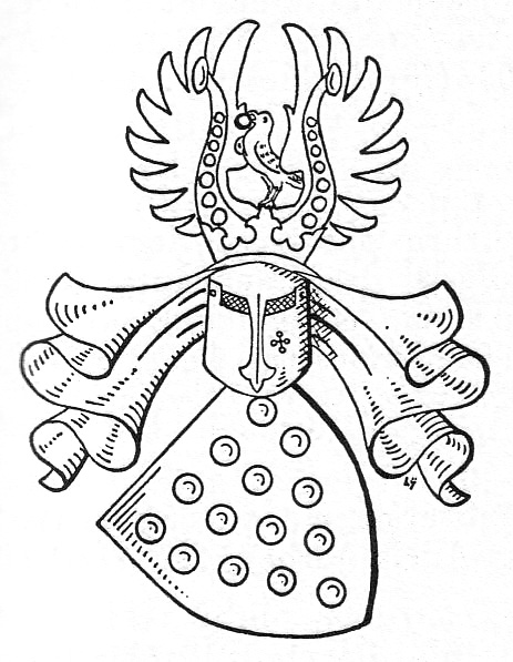 Das Wappen der Familie von Bülow